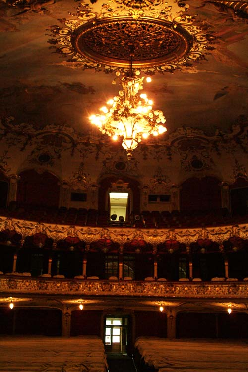 Iaşi National Theatre